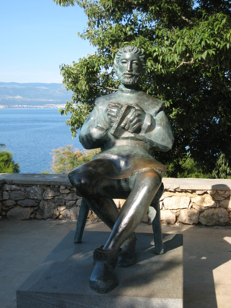 Spomenik pop Blaž Baromić, Vrbnik, Croatia